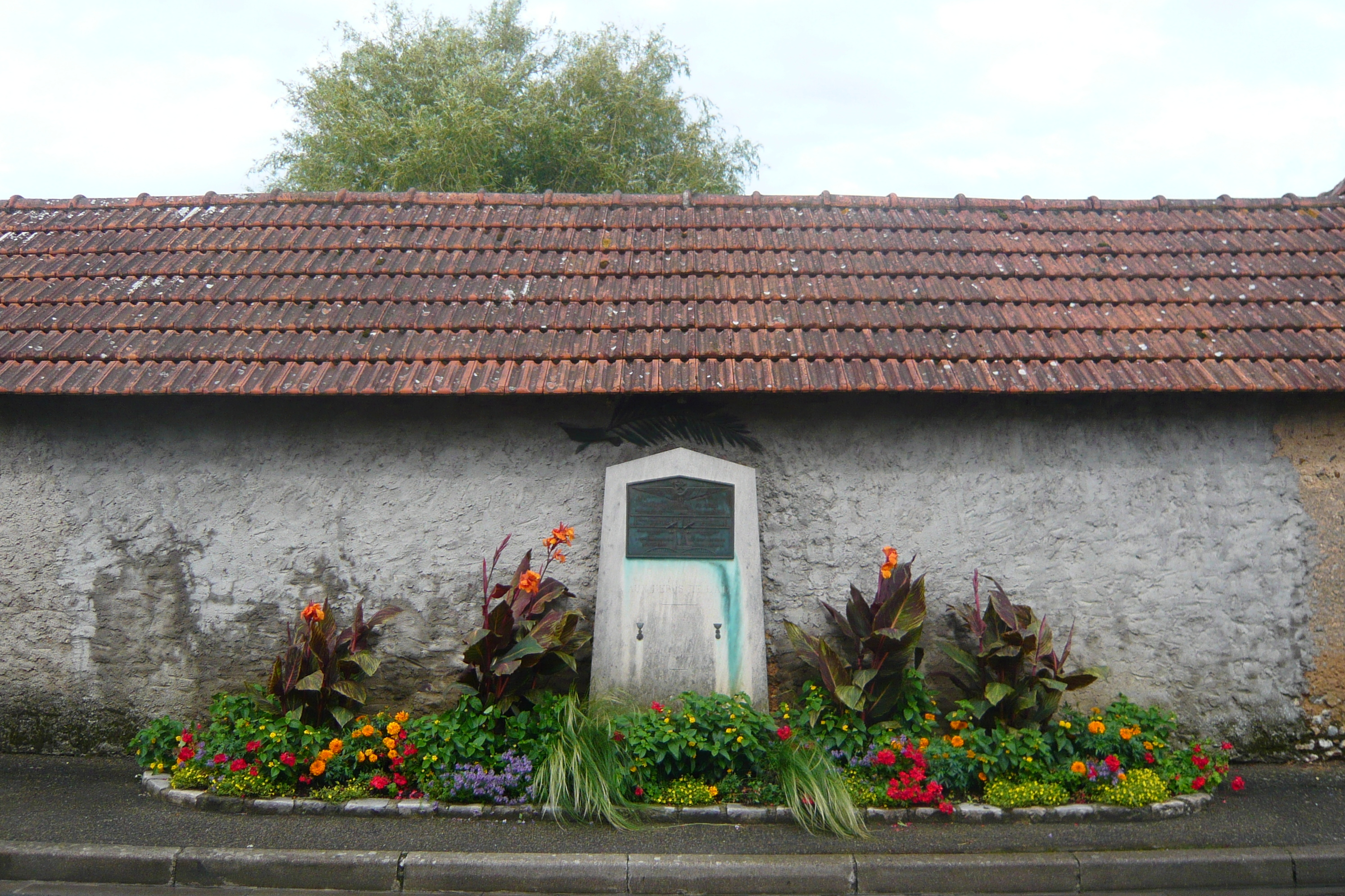 Stèle "Morts pour la France" 26 août 1930, 66 route de Chavannes, Lèves, Eure-et-Loir (France).